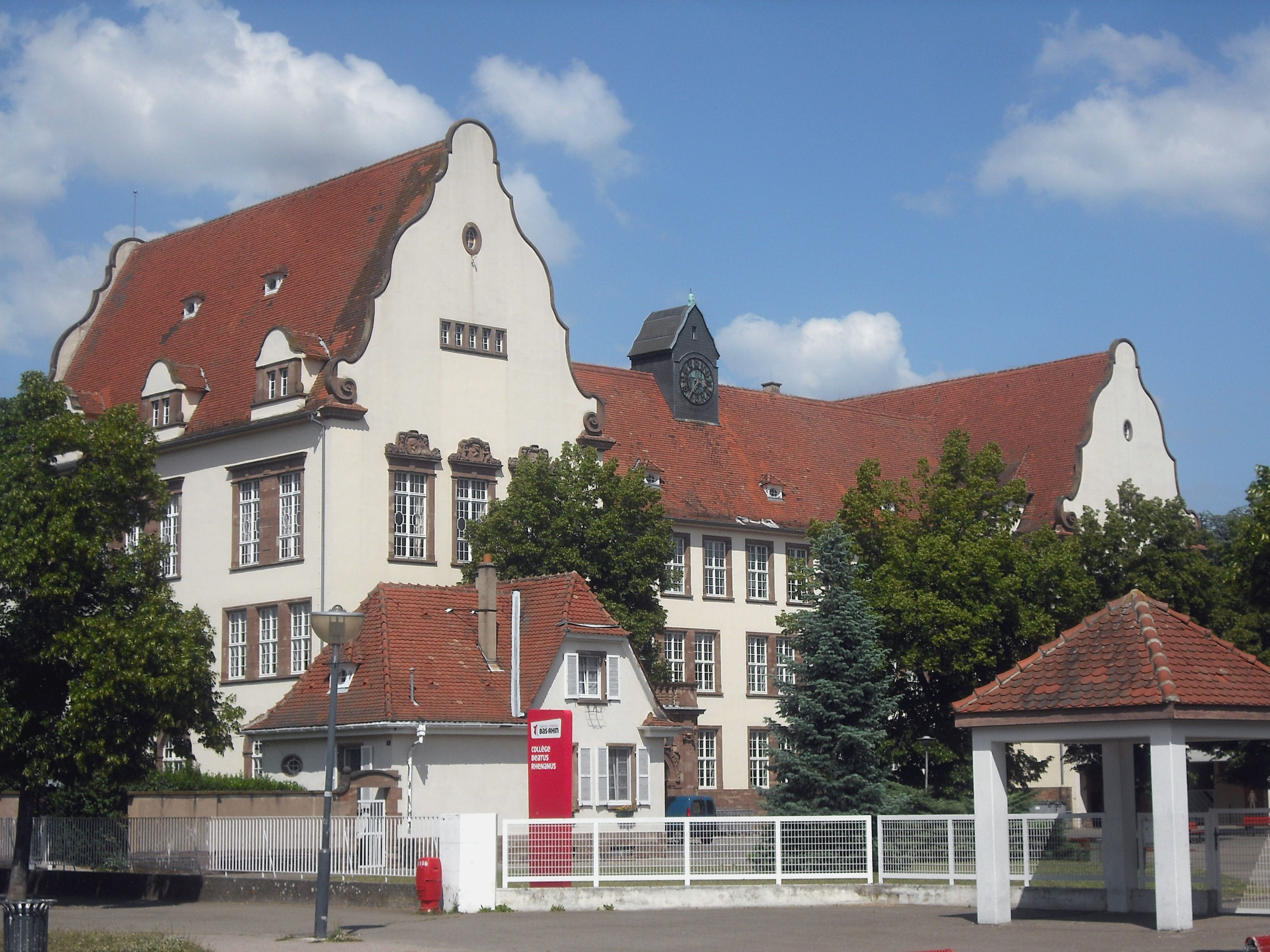 Lycée Koeberlé, Sélestat, Bas-Rhin, France.